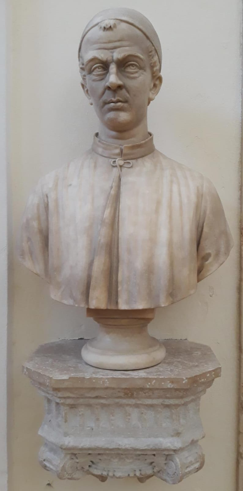 Busto di Bartolomeo Cipolla